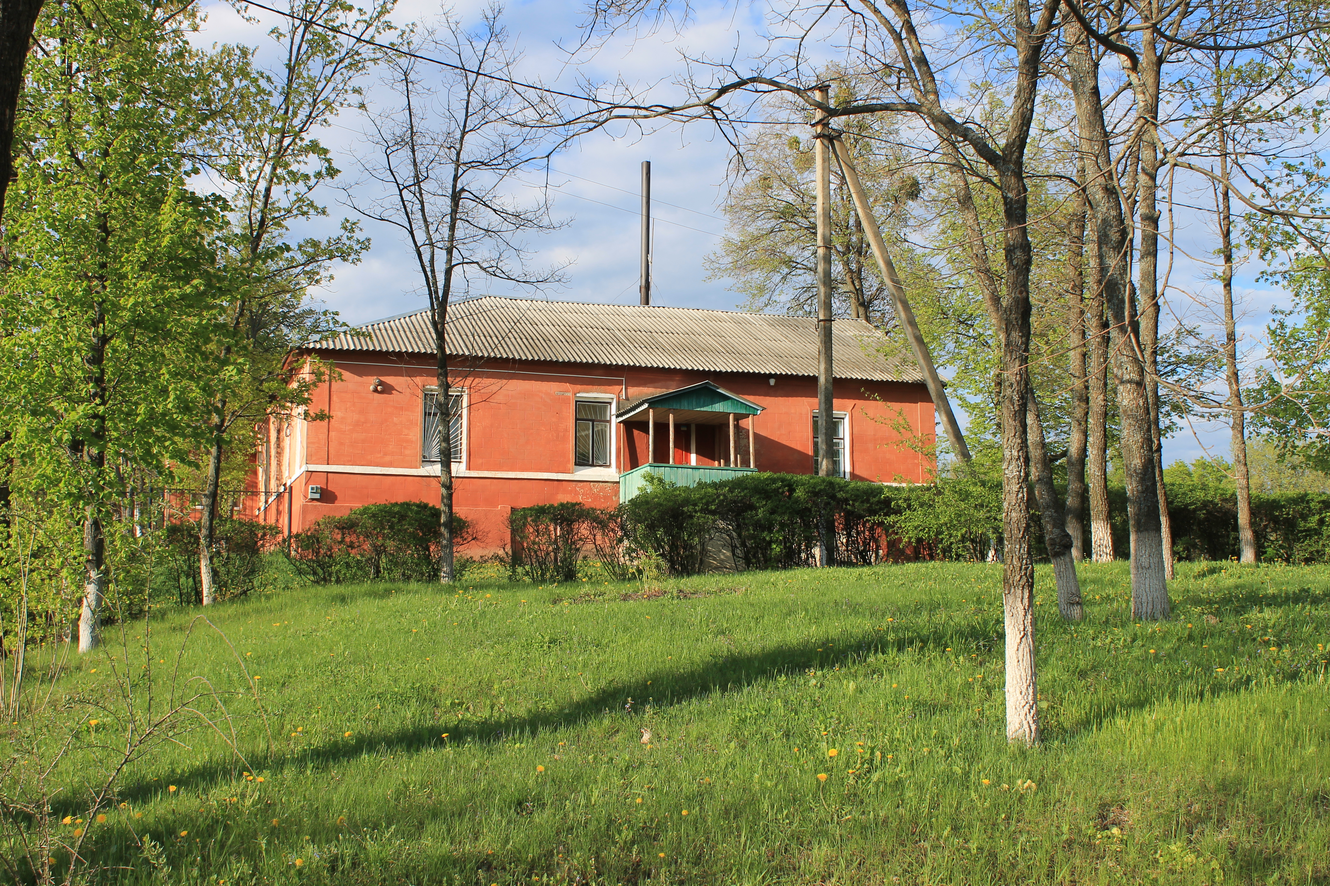 Садибний будинок — Контора управляючого (сучасне використання — клуб, фондове та службове приміщення), музею, бібліотека, котельня),, вулиця Приозерна,3, с.Сковородинівка, Золочівський район, Харківська обл.